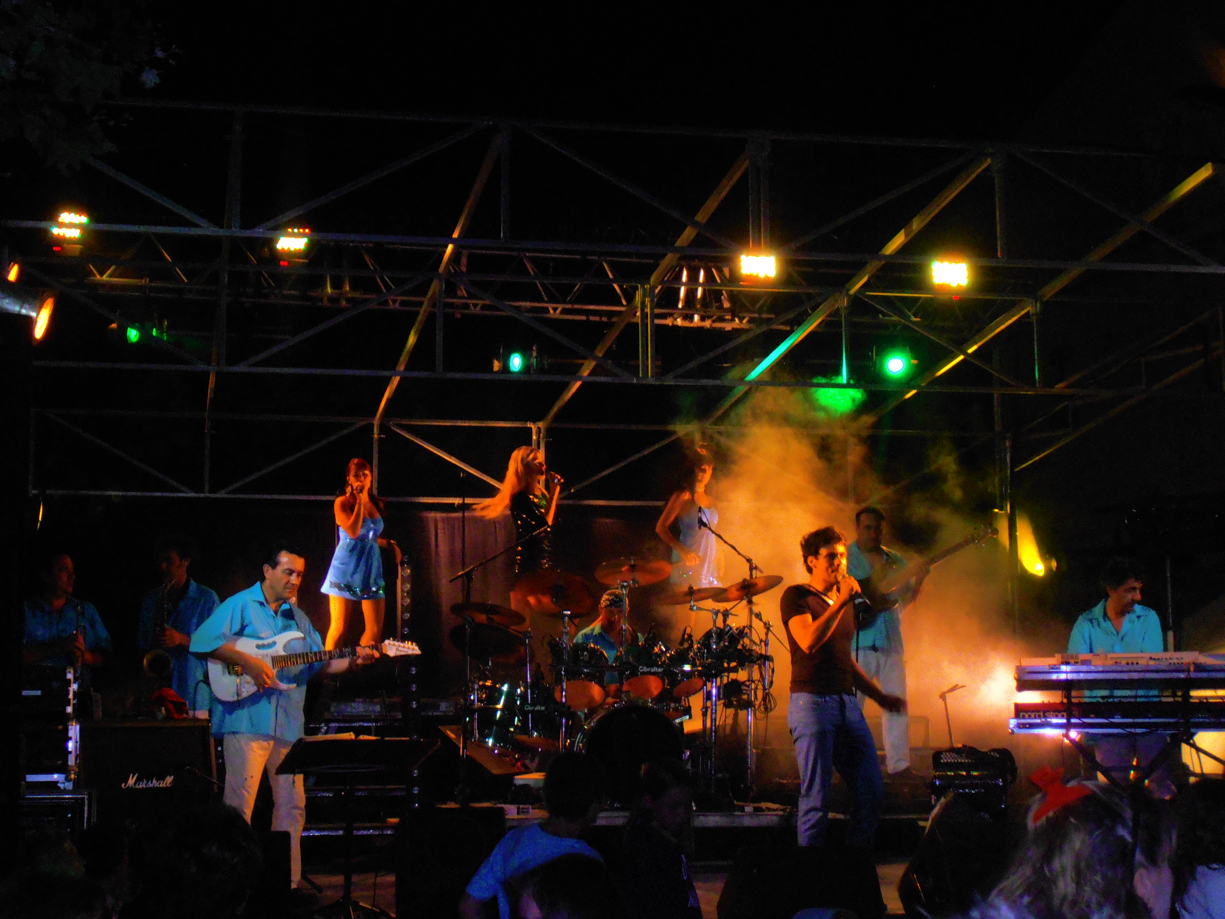 Var, Tourtour, Musique et danse : Animation d'été au village